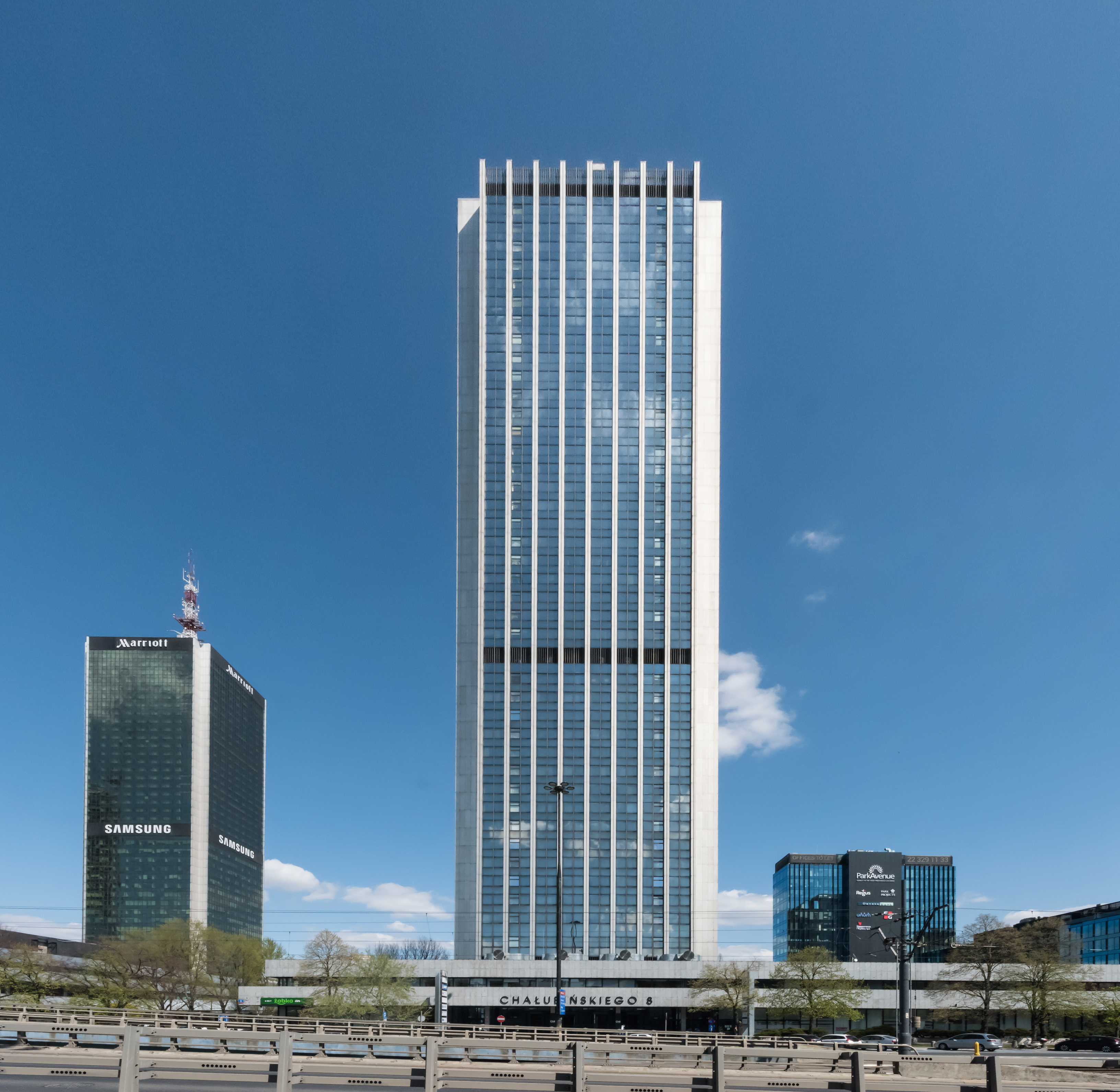 Biurowiec Chałubińskiego 8 przy ul. Tytusa Chałubińskiego 8 w Warszawie